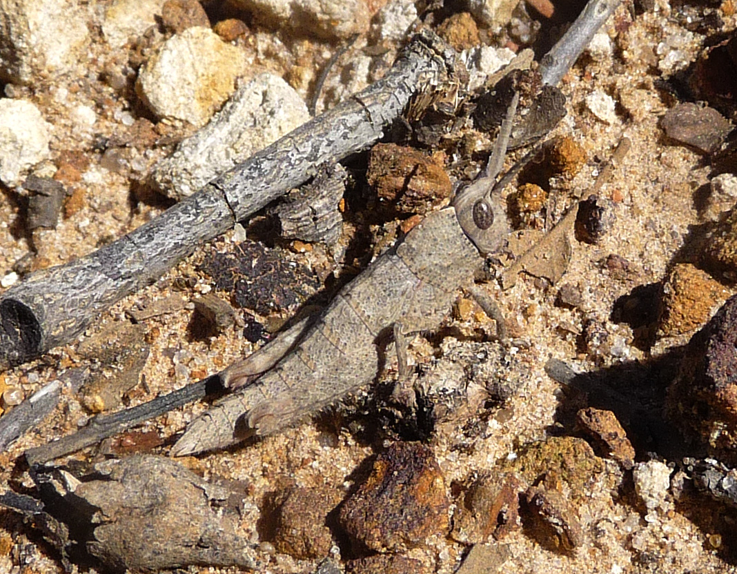 Acinipe tibialis. Pamphagidae